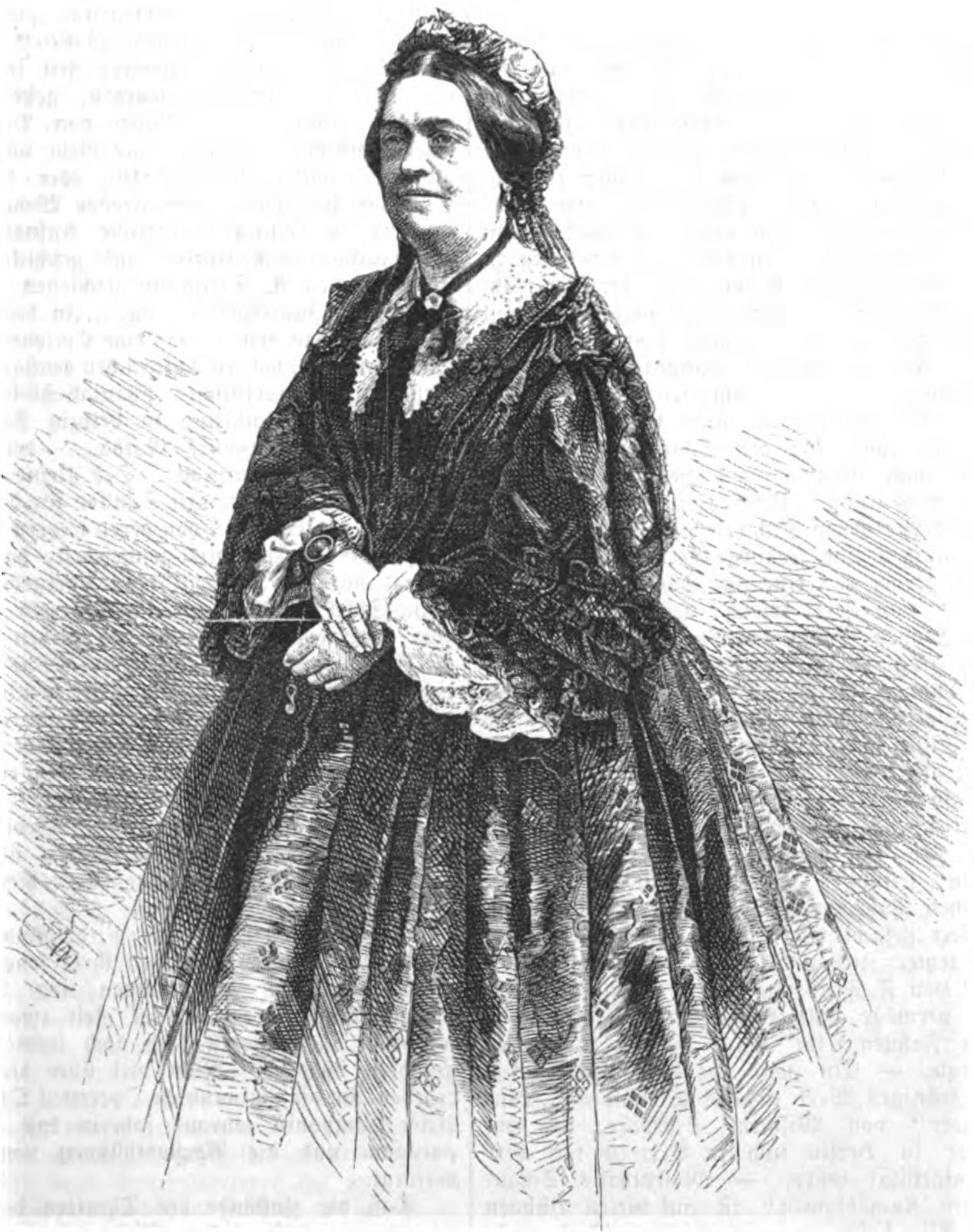 Charlotte Birch-Pfeiffer, deutsche Schauspielerin und Schriftstellerin im 19. Jh.